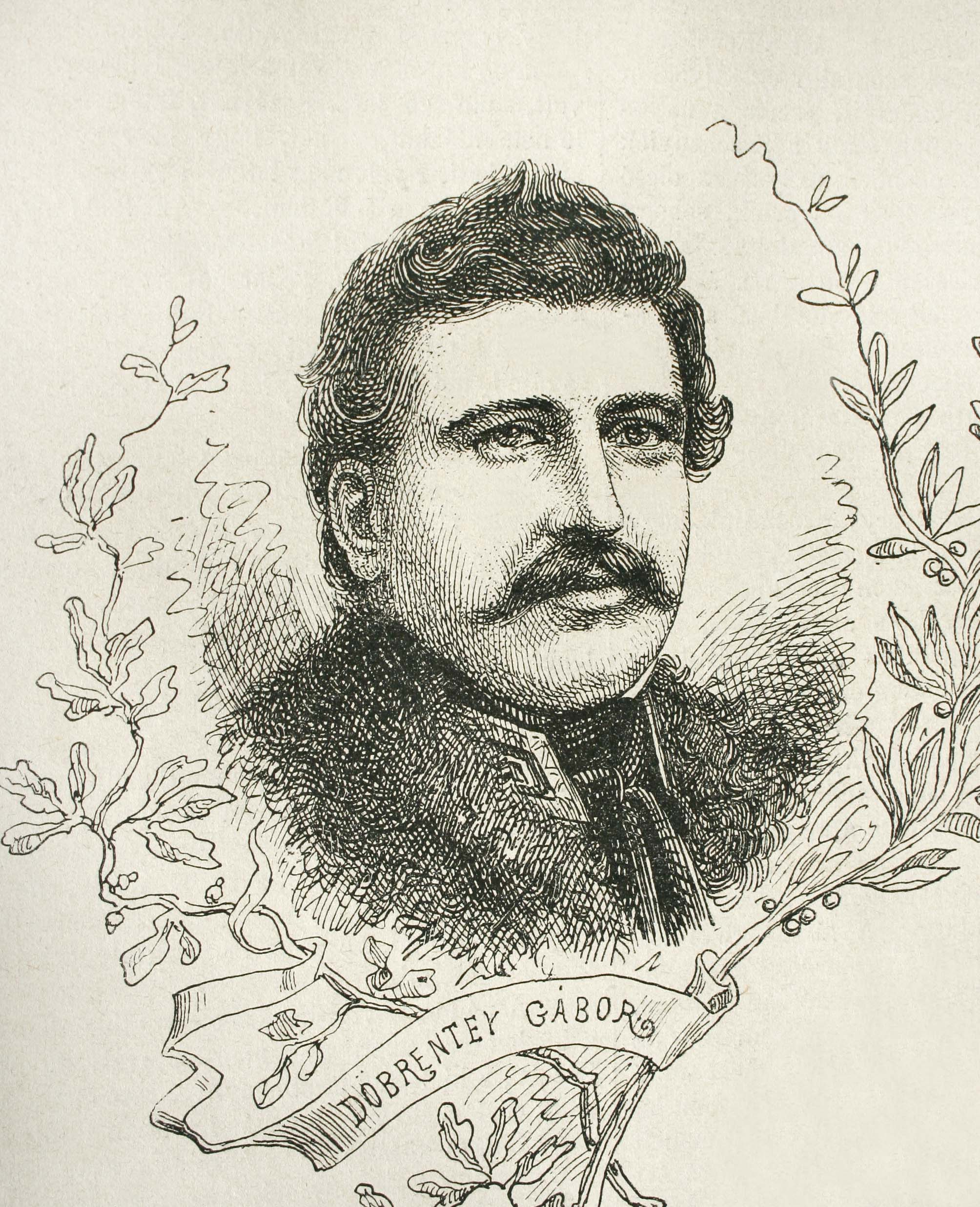 Döbrentei Gábor arcképe - Ország-Világ című hetilap, 1880.